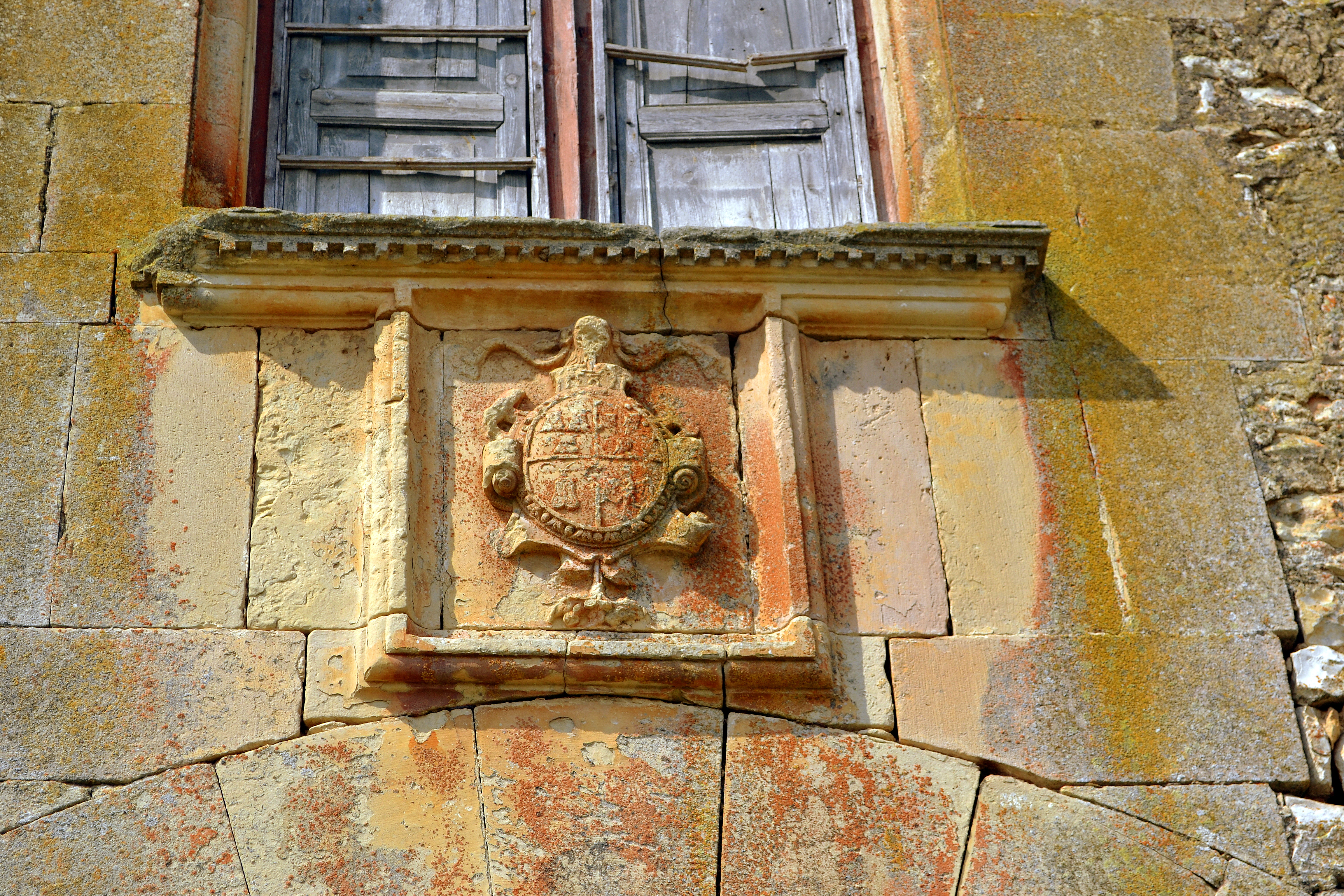 Torre Saportella (Granyanella)